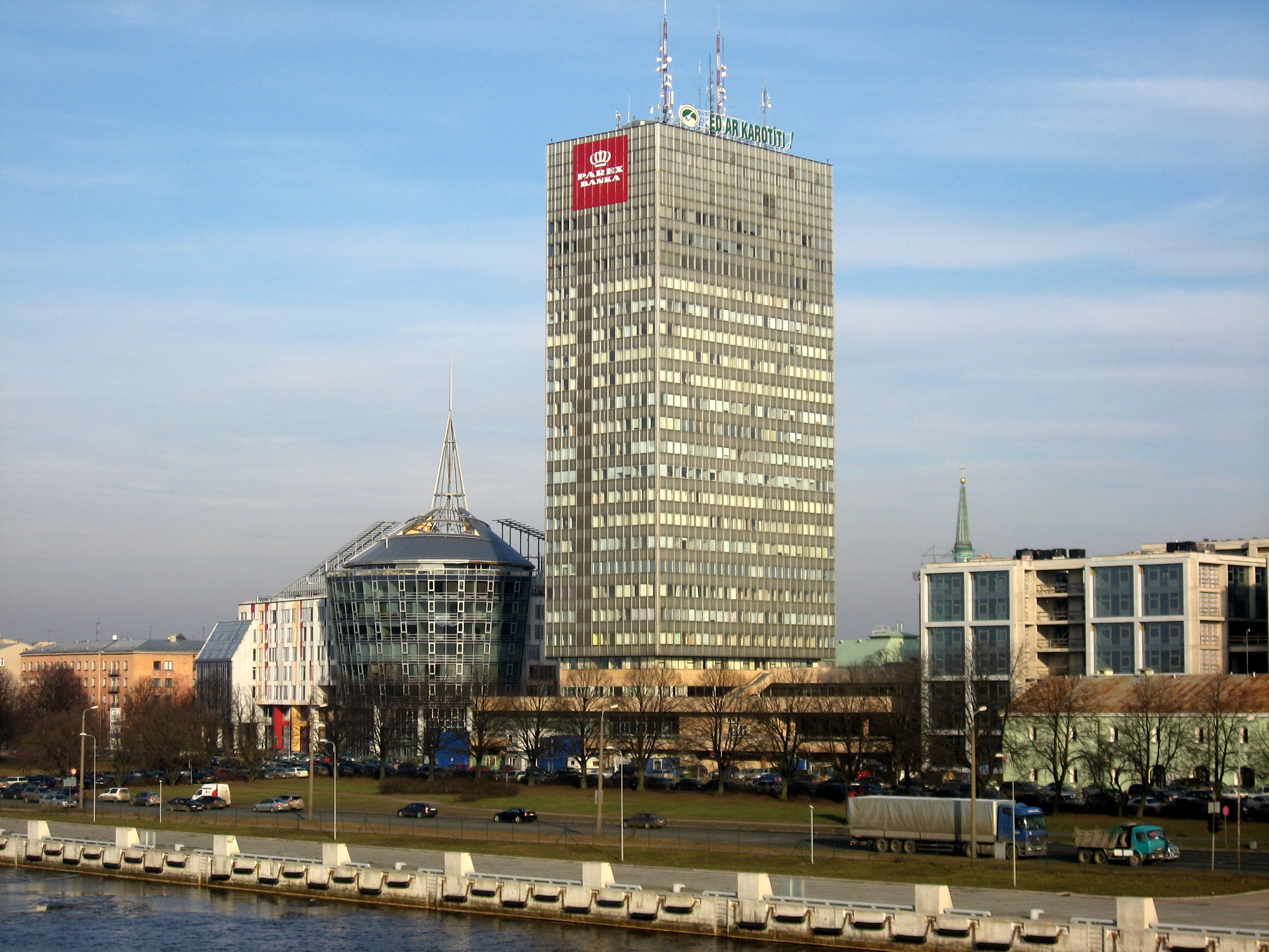 Riga, nábřeží Daugavy